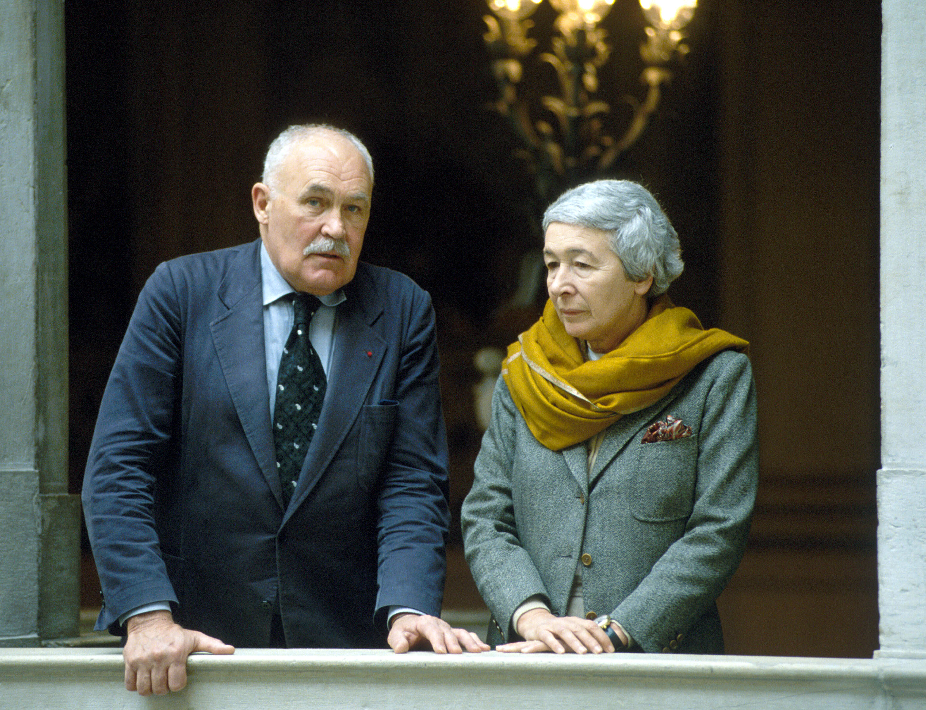 L'architetto Gae Aulenti con Pontus Hulten a Palazzo Grassi di Venezia nel 1986